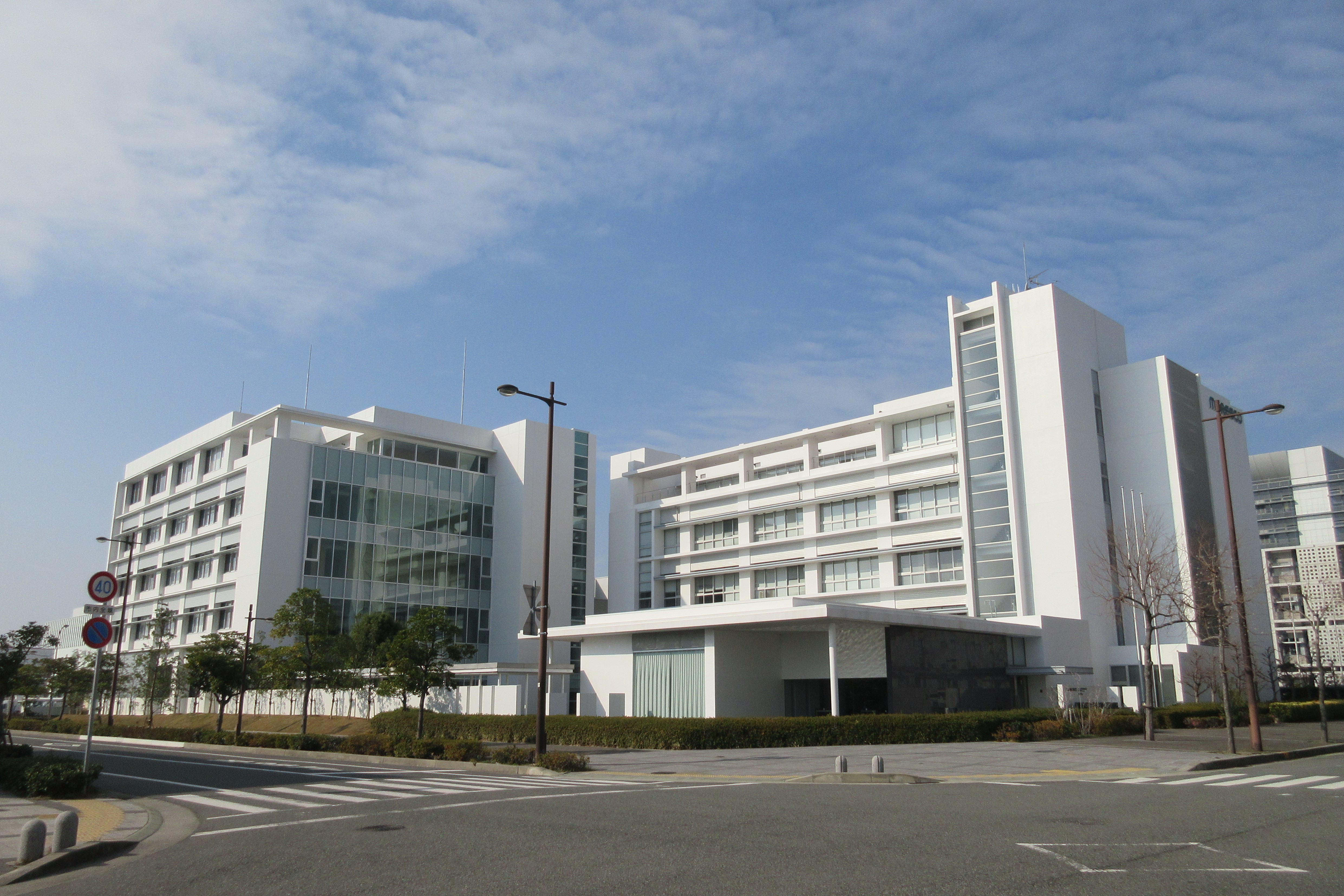 モレスコ本社